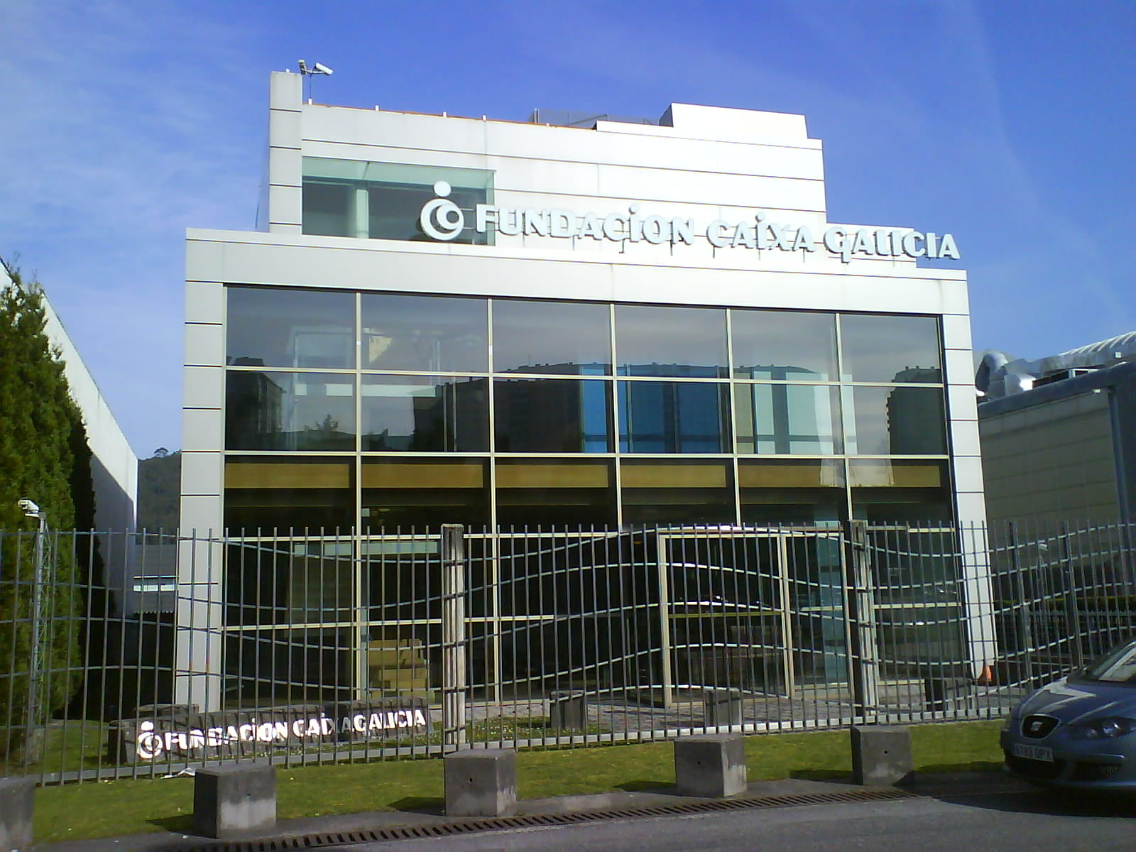 Edificio da Fundación Caixa Galicia no polígono industrial de POCOMACO, A Coruña.